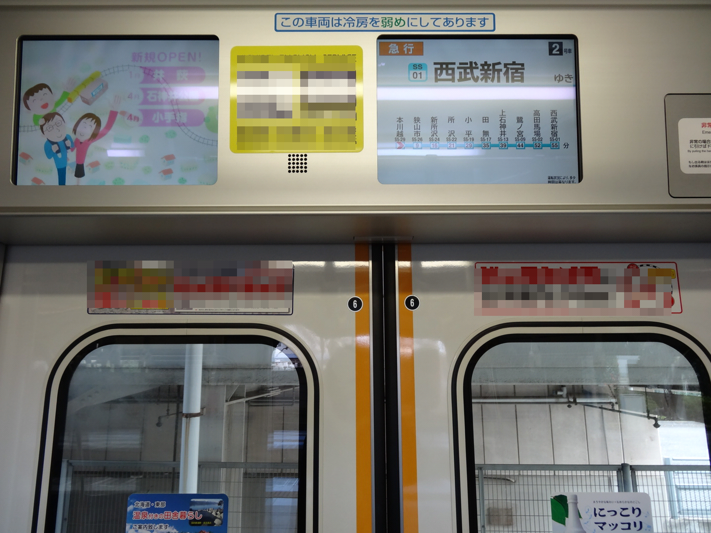 西武30000系（1次車）の鴨居部案内表示器。プログラム更新後